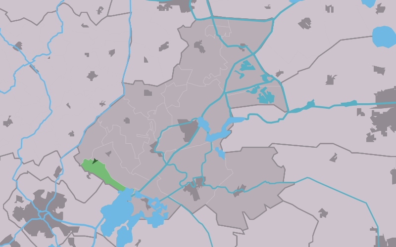 Kaartsje fan himrik fan Sibrandabuorren